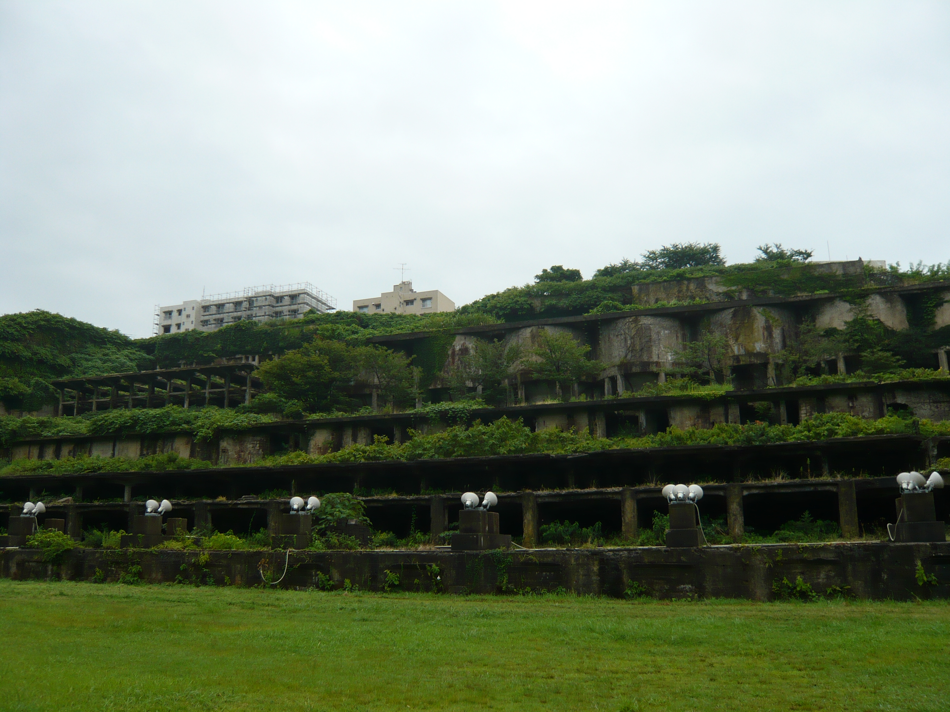 佐渡金山・北沢地区。選鉱場